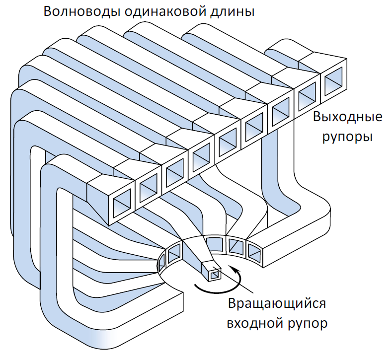 Облучатель органного типа для сканирующего радара